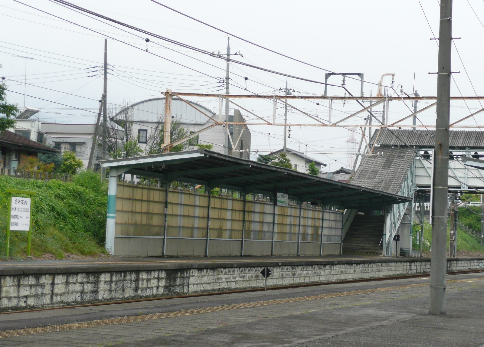 松井田駅ホーム